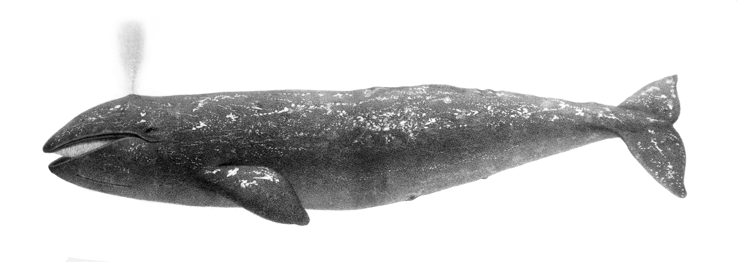 Eschrichtius robustus